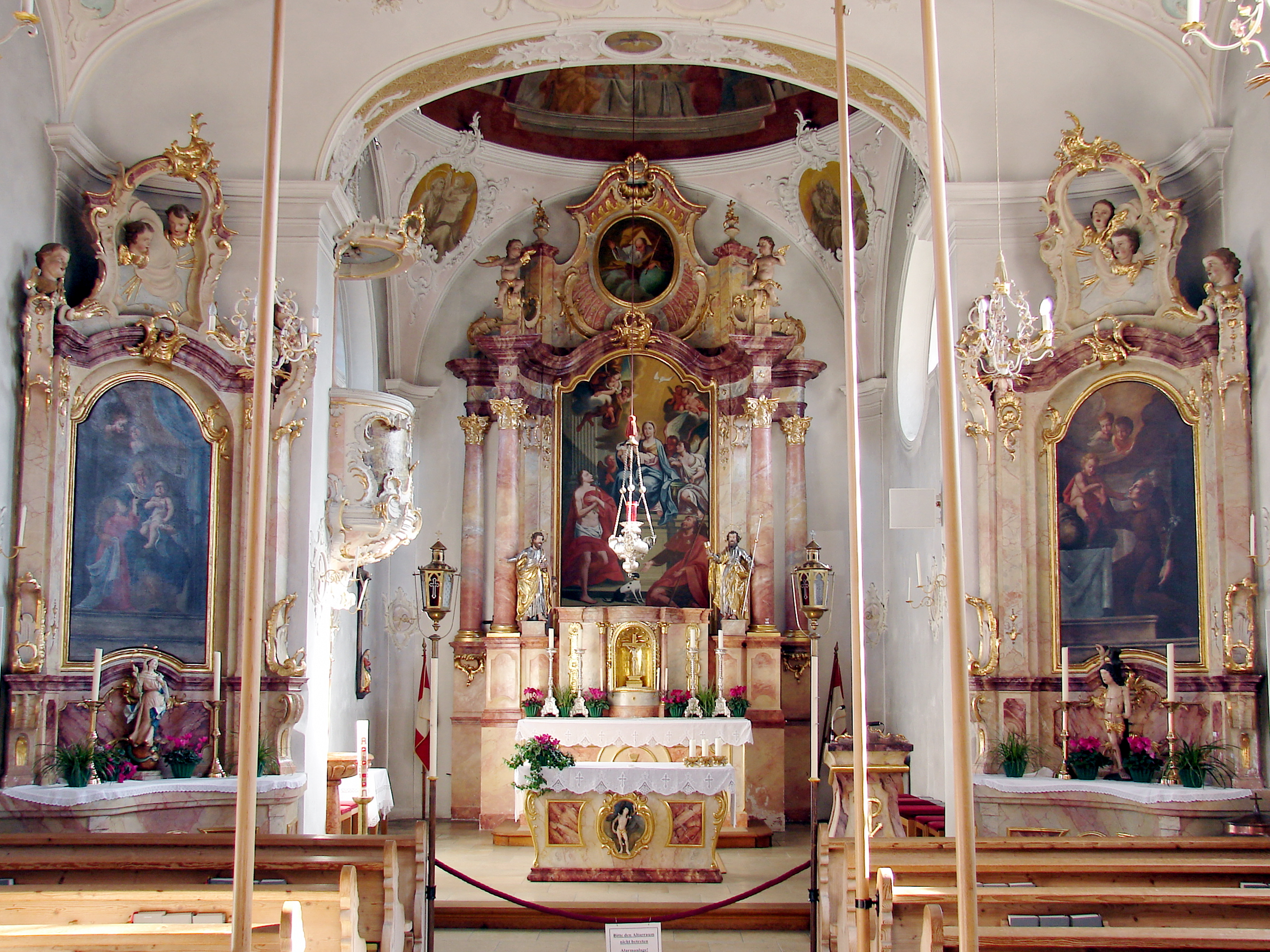 Rokoko-Kirche St. Sebastian in Krün (erbaut 1760).